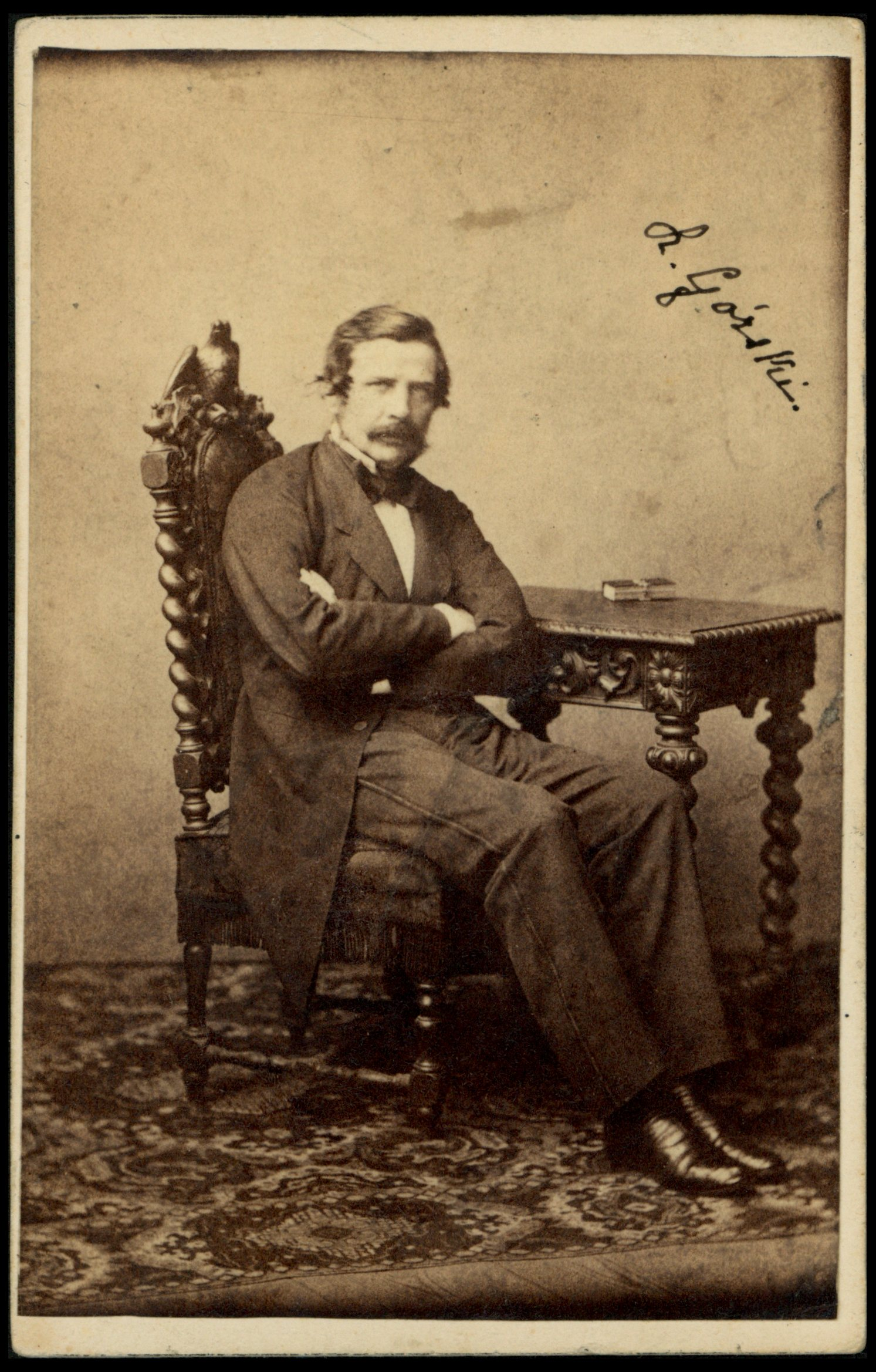 Ludwik Górski, ok. 1861 r.